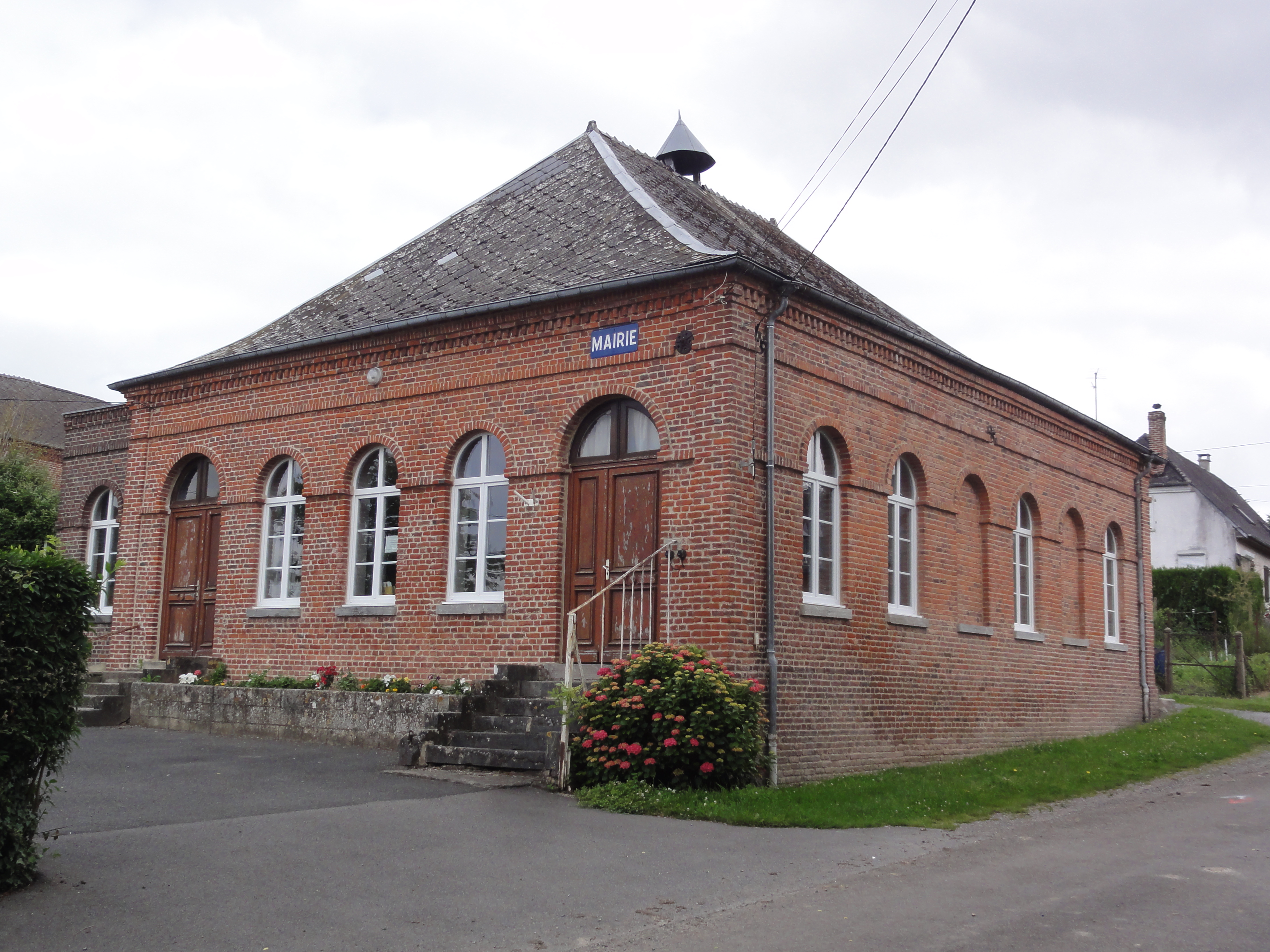 Gergny (Aisne) mairie